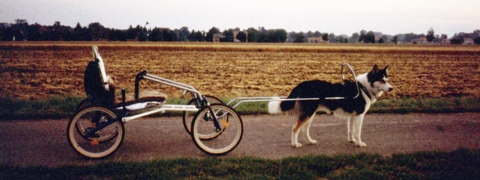 Sacco